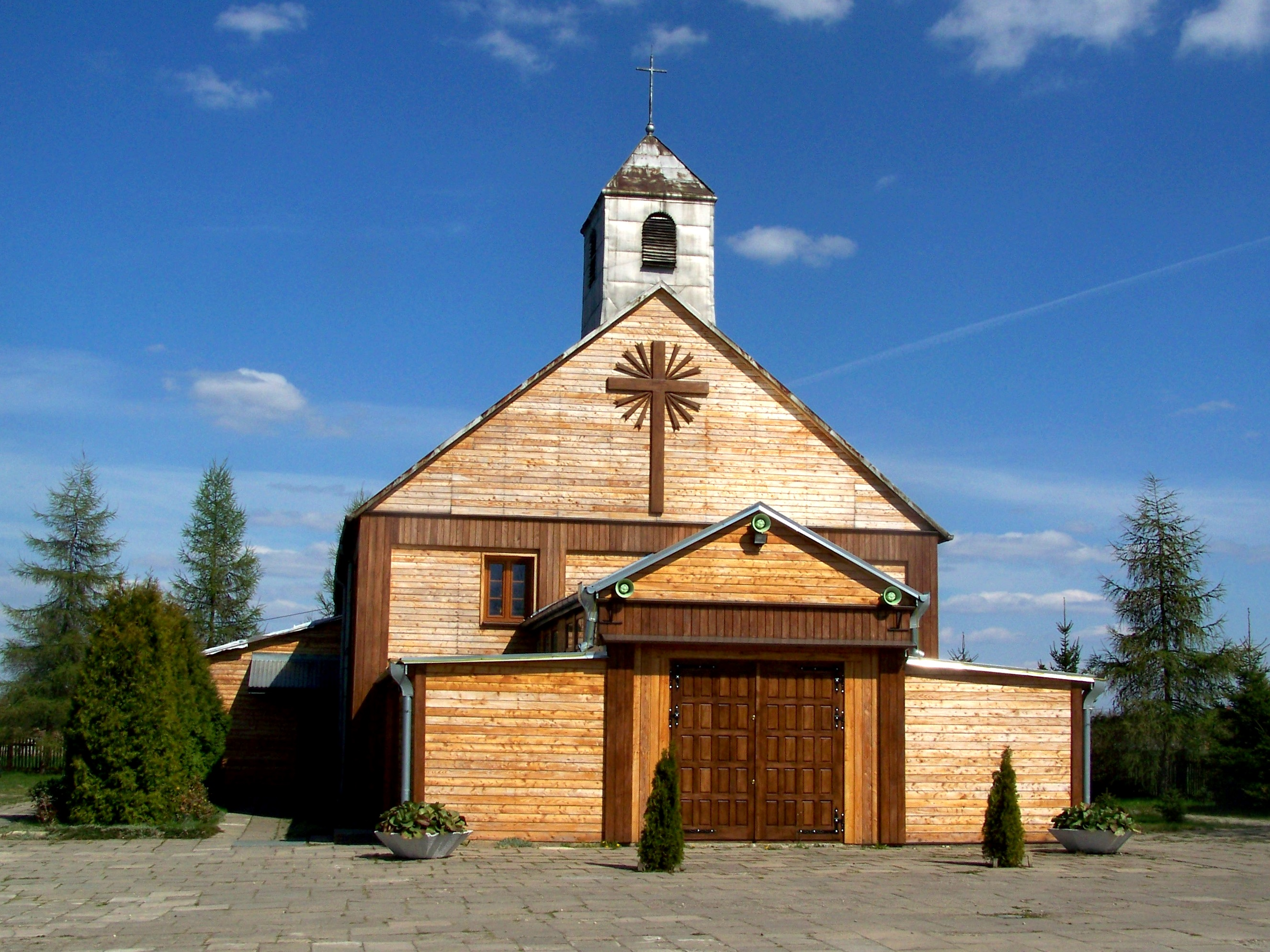 Kościół pw. św. Siostry Faustyny w Sokołowie Podlaskim. Do jego budowy użyto materiałów z rozebranego kościoła pw. św. Rocha, dlatego też często bywa nazywany kaplicą św. Rocha.